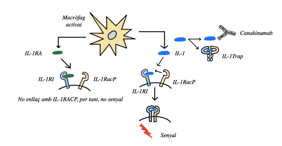 La unió entre la IL-1 i el seu receptor fa que aquest adquireixi un efecte estèric a les seves dues cadenes (IL1-R1 i IL1RacP) i desencadena l'activació de la cèl·lula T. El IL-1 RA s'uneix al IL-1R1, sense associació amb IL-1RAcP. Així, l'anakinra, una IL1RA modificada recombinant, inhibeix l'activació de IL-1α i IL-1β. La IL-1β està específicament lligada amb Canakinumab. El Rilonacept inhibeix IL-1α i IL-1β.